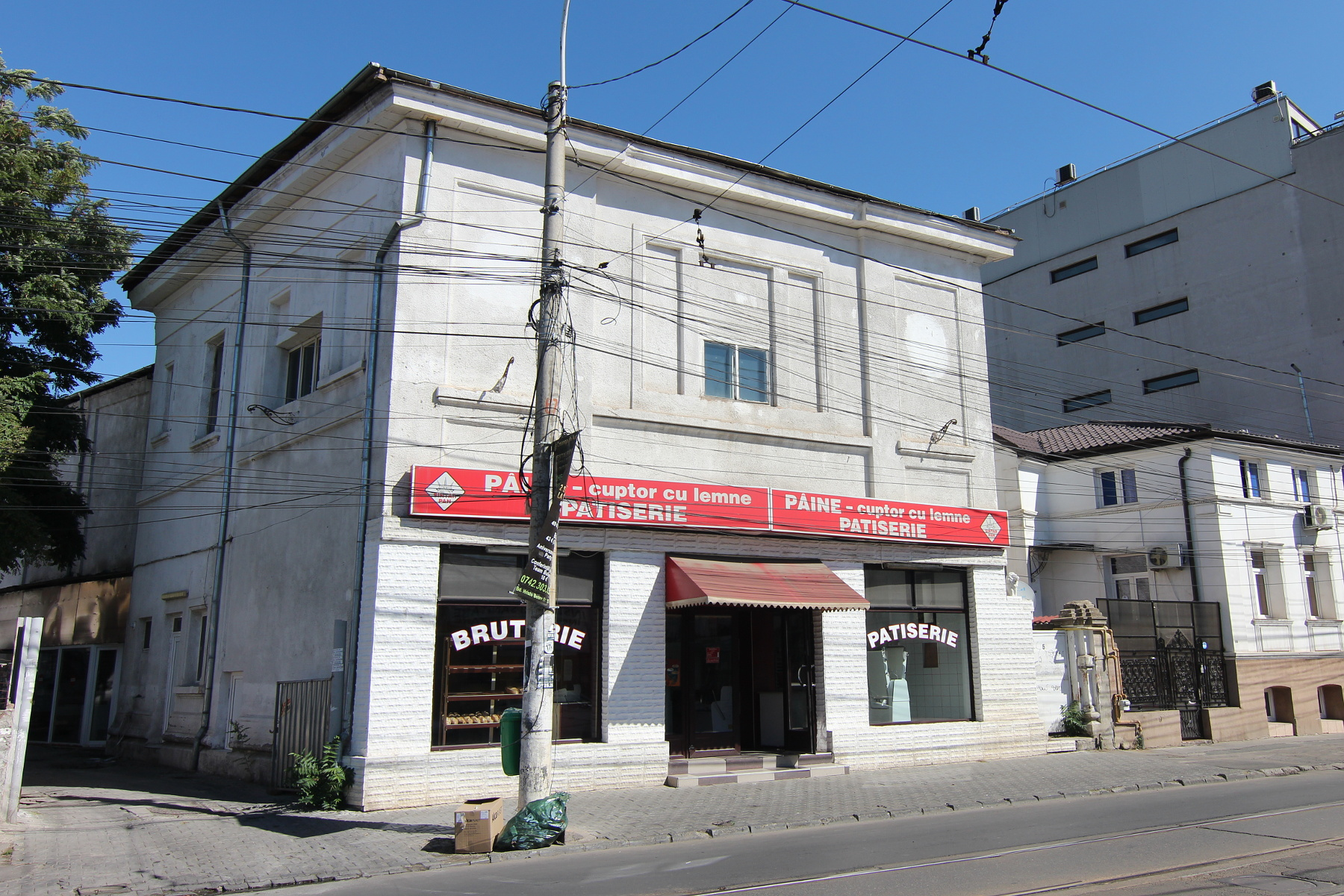 Fostul Cinematograf "Arta"